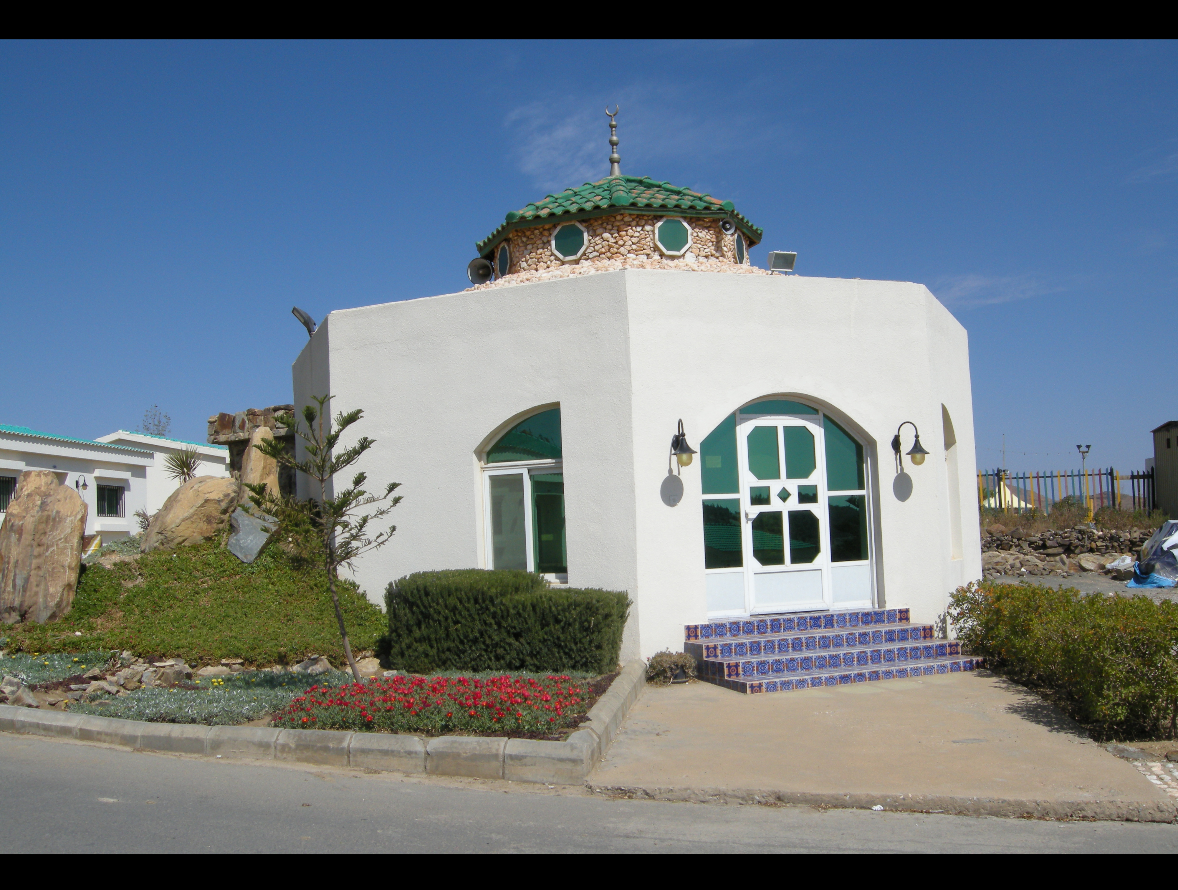 By Basheer Olakara